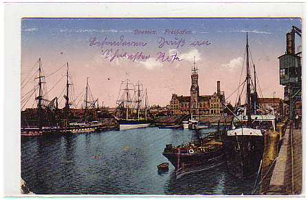 1918 Old images